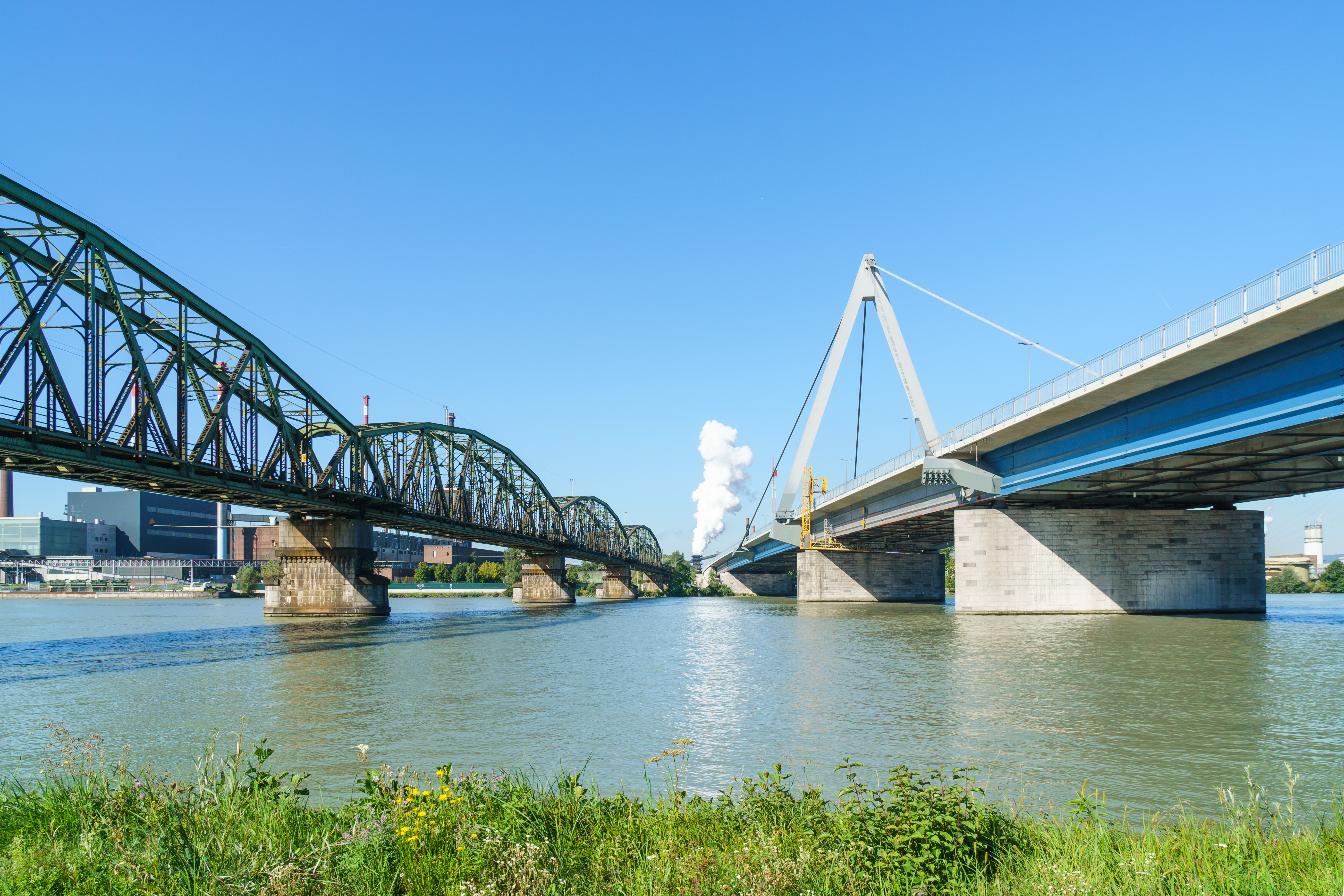 Zwischen den Donaubrücken der Summerauer Bahn und der Bundesstraße B 3. Blick von Donauradweg über den Fluss zum voestalpine Kraftwerk, Kraftwerkring 2-4 in Linz